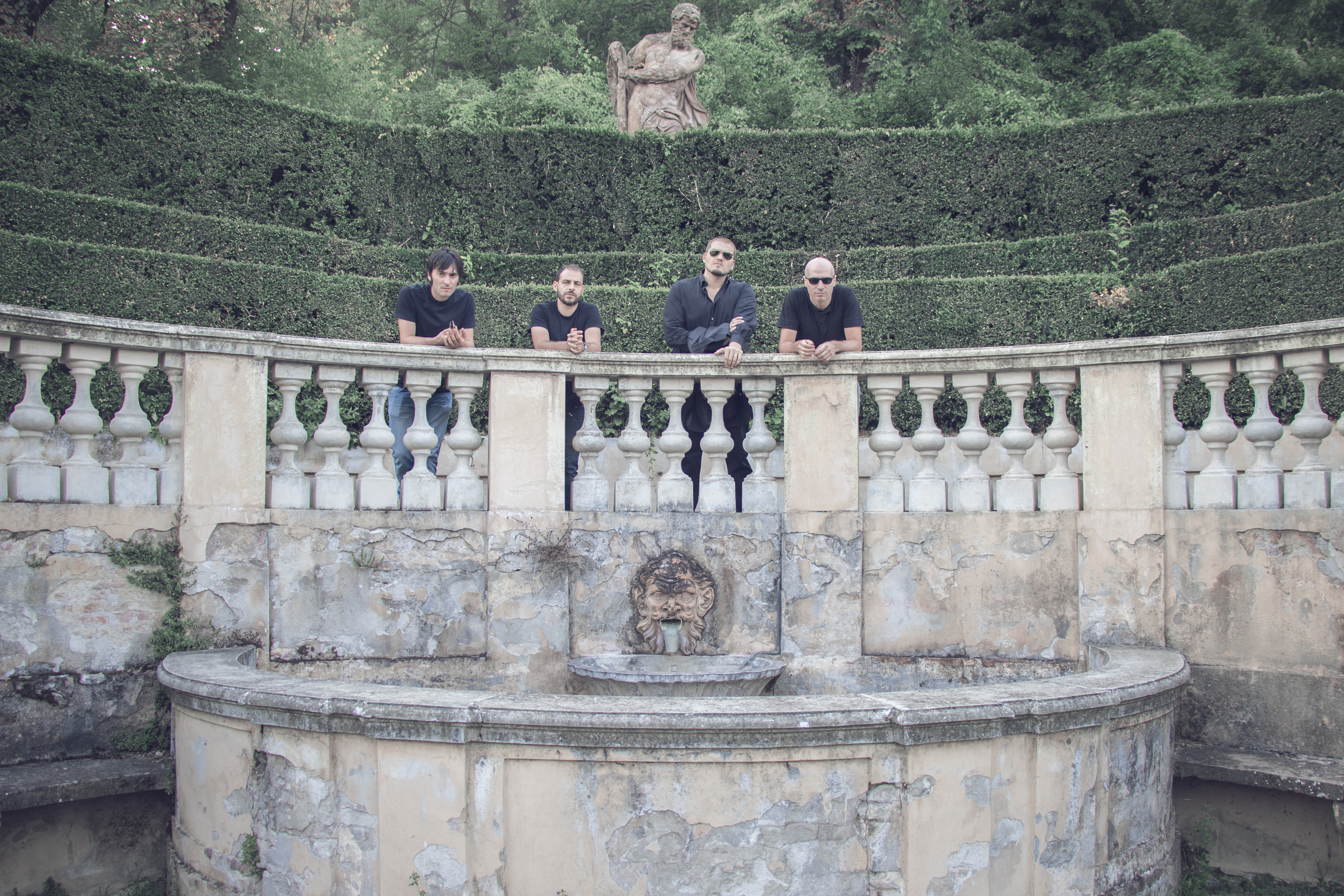 I Phidge nello shooting promozionale di "Paris", 2016